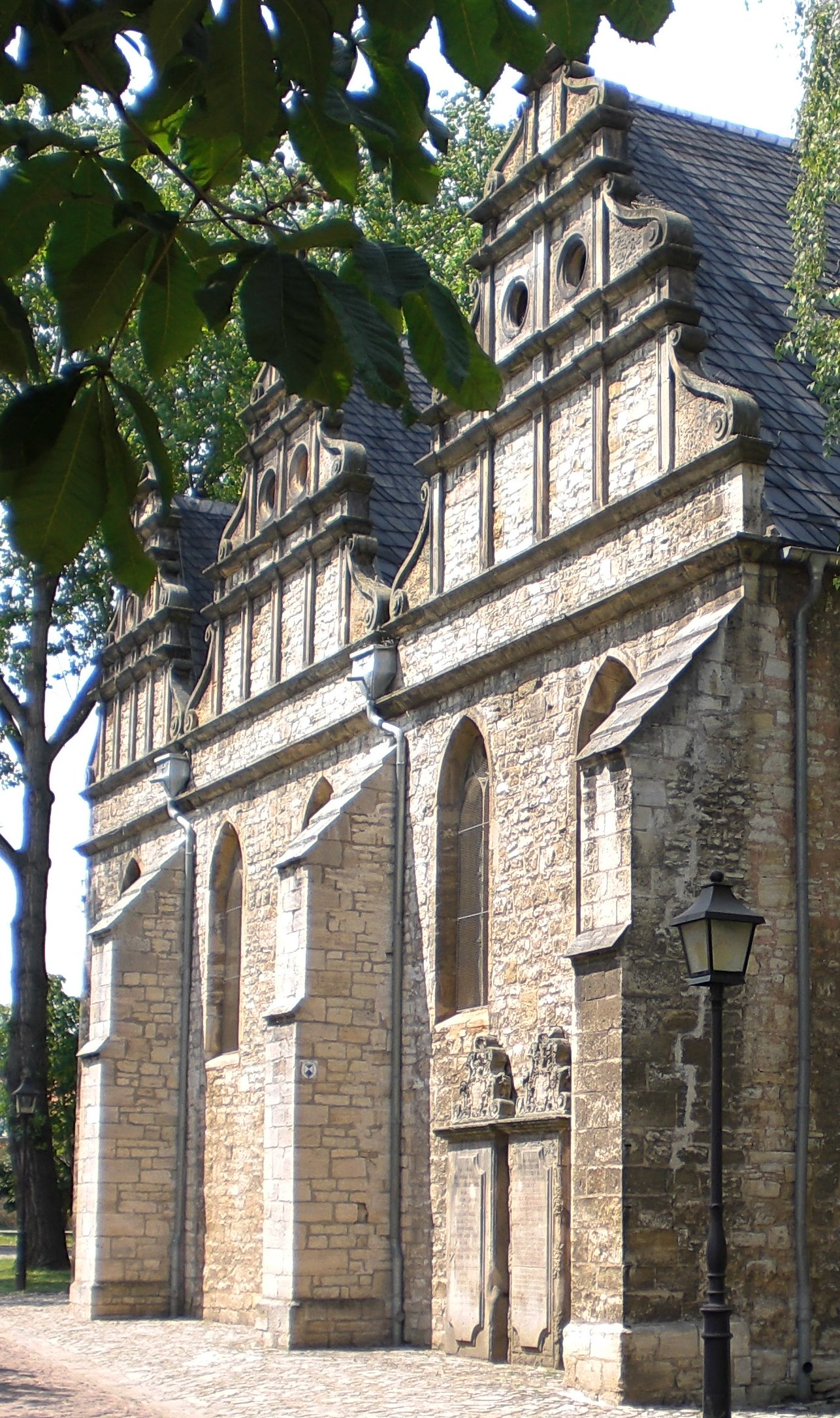 südlicher Giebel der Martinkirche Kroppenstedt